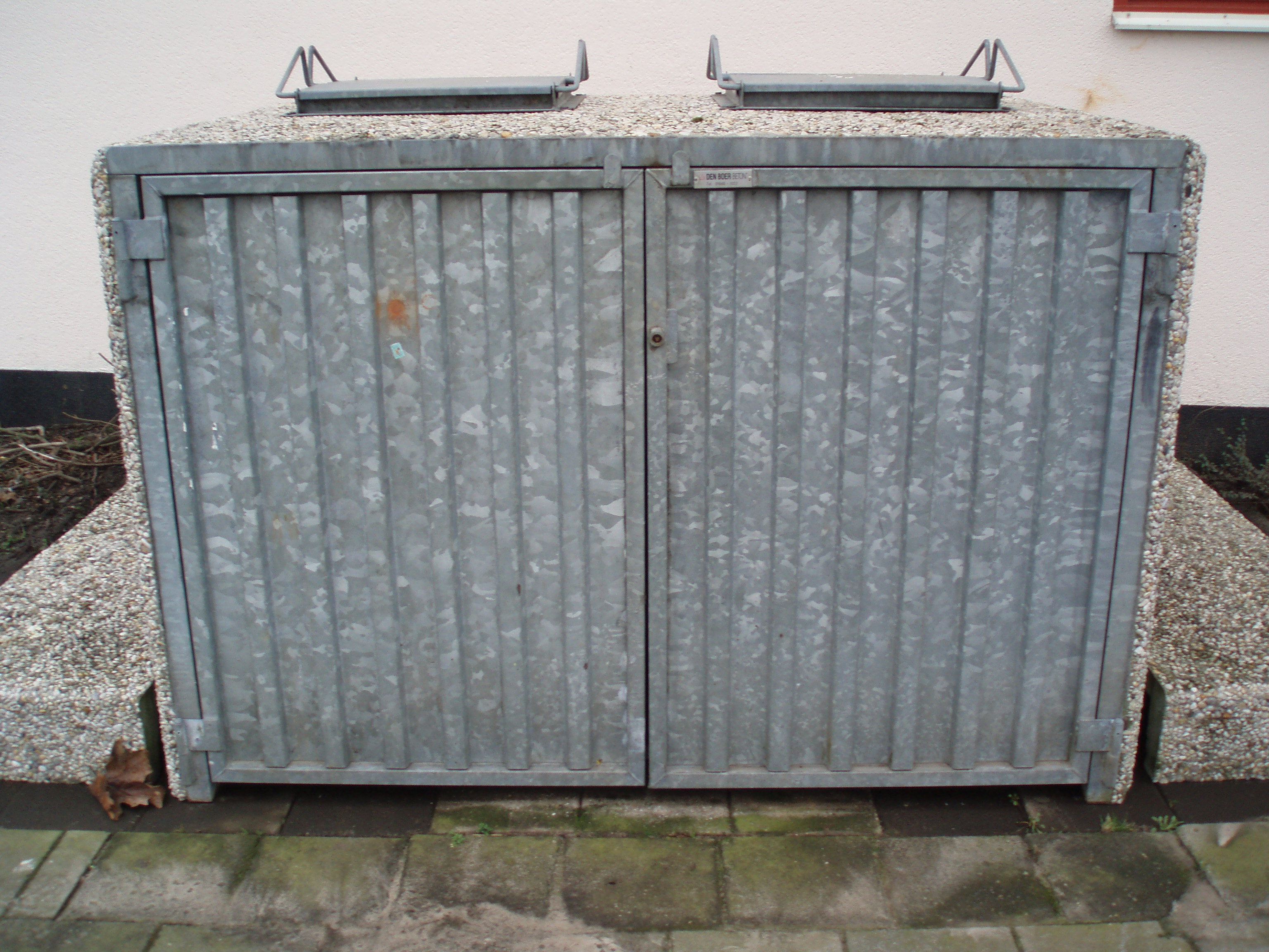 Vuilcontainer behorend bij flatgebouw in de wijk Dieze-Oost te Zwolle.